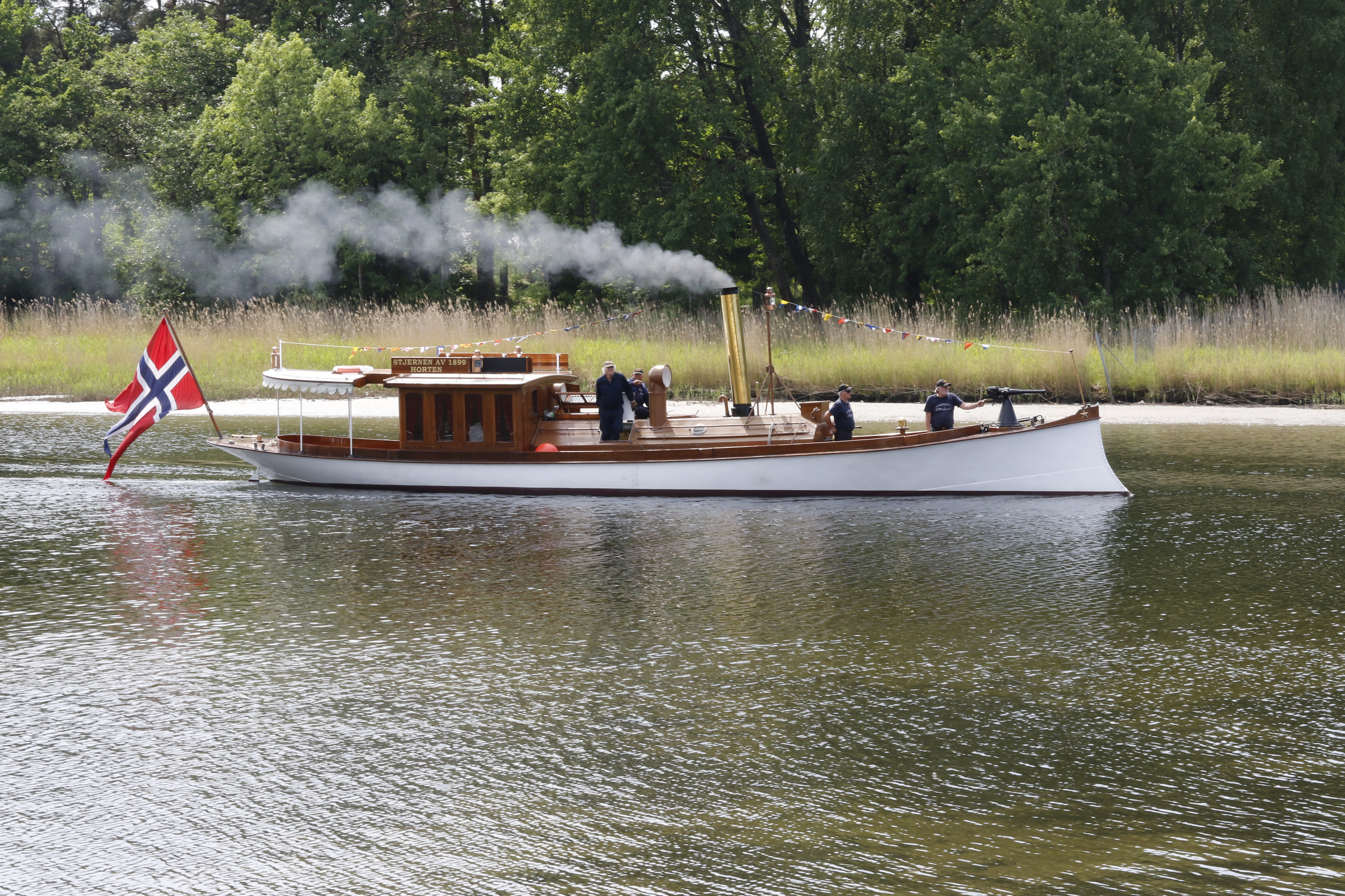 Seilas inn mot Løvøya utenfor Horten.